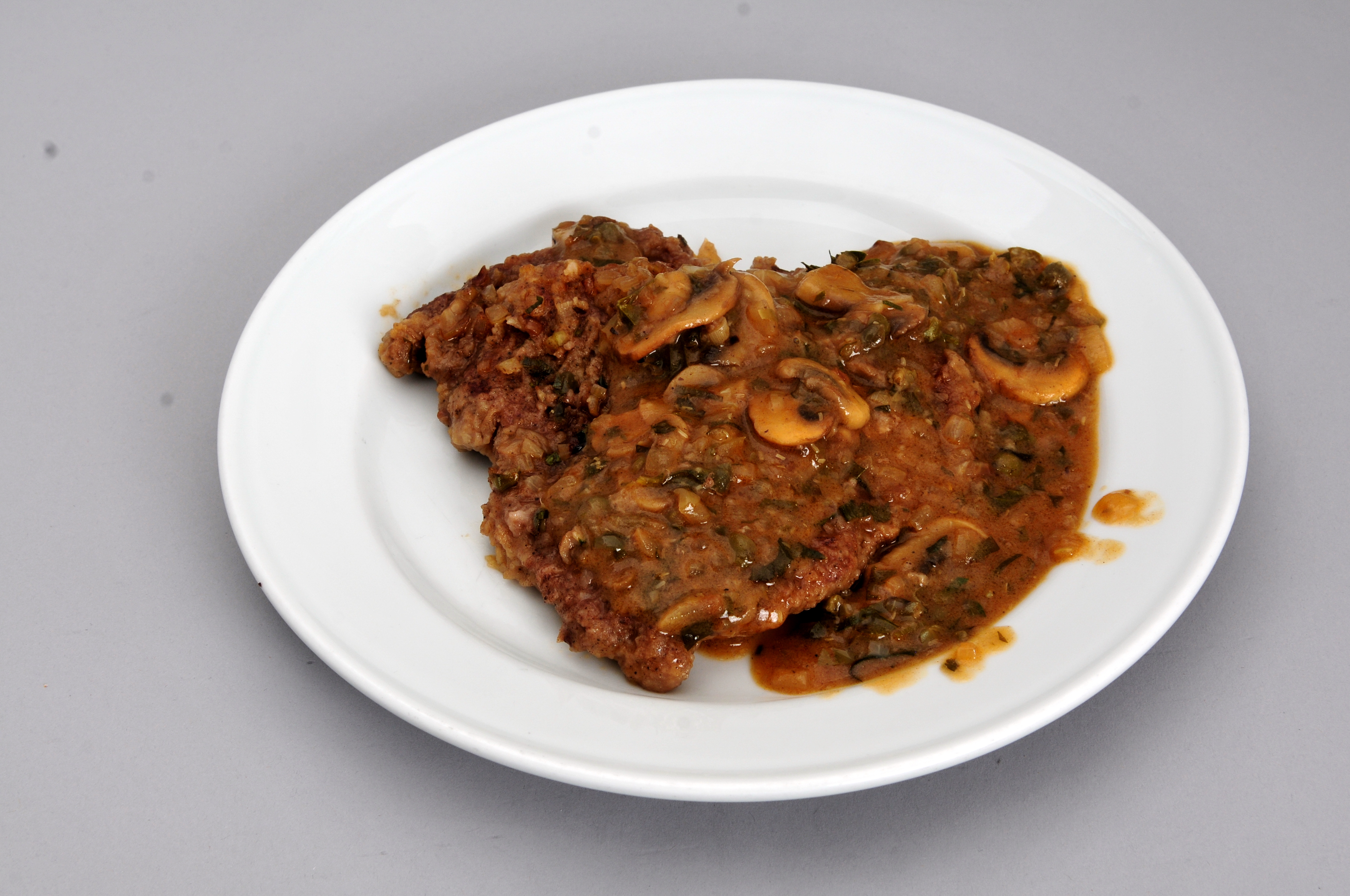 Treffen der Redaktion Essen und Trinken ion Wien: Rostbraten à la Girardi, angerichtet ohne Beilage